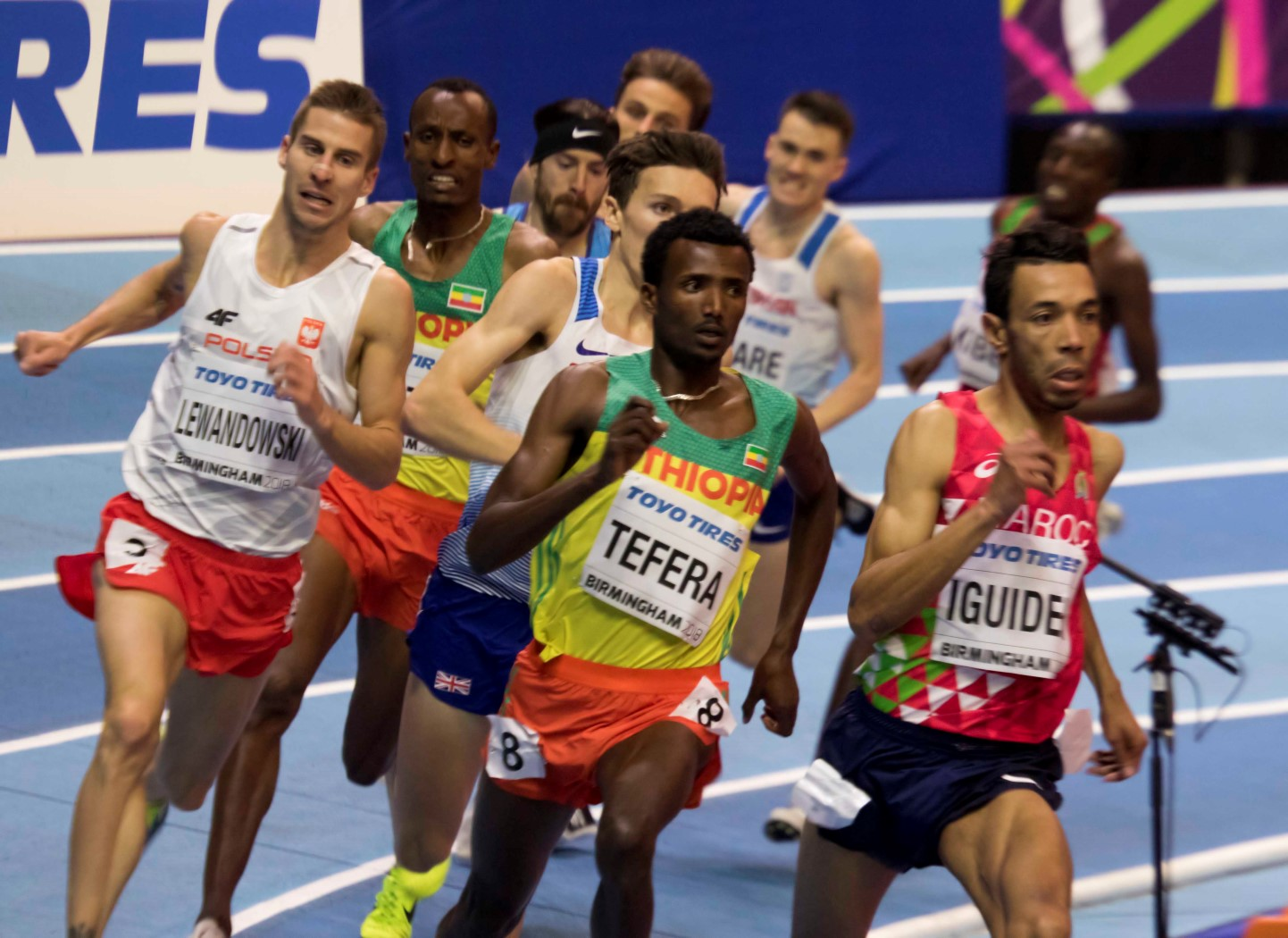 WK040144 finale 1500m